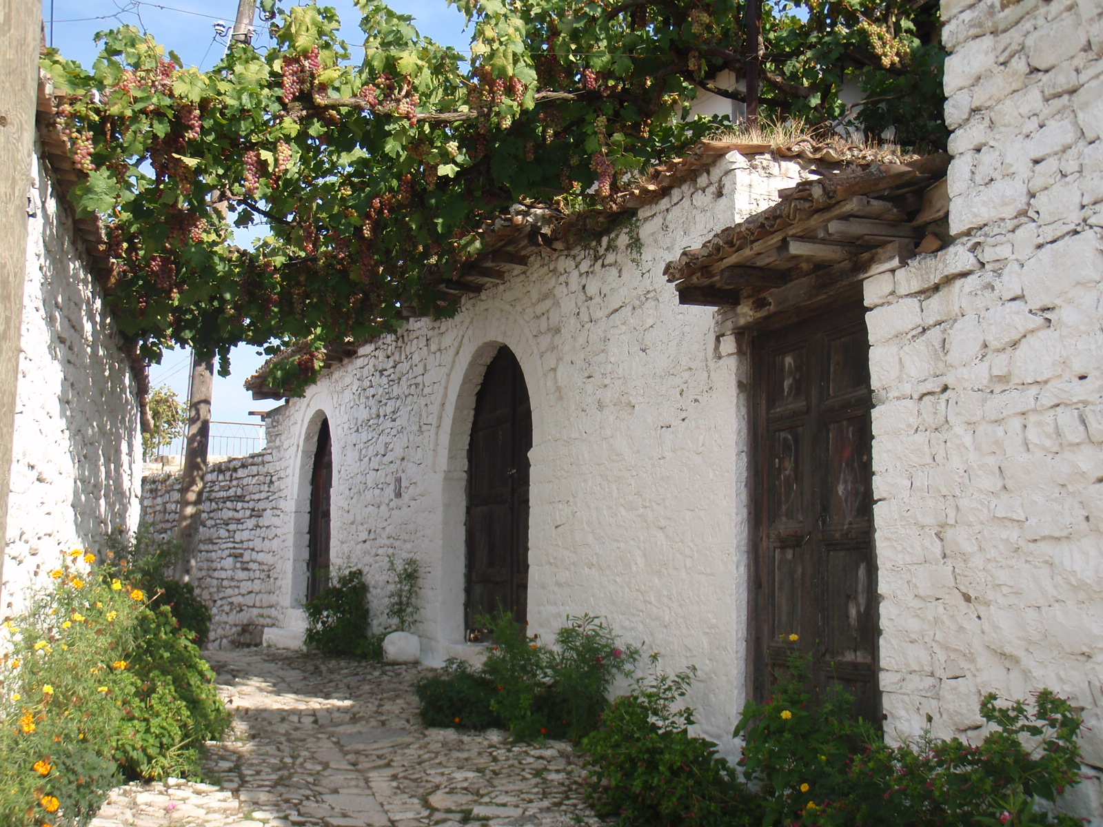 Berat kale